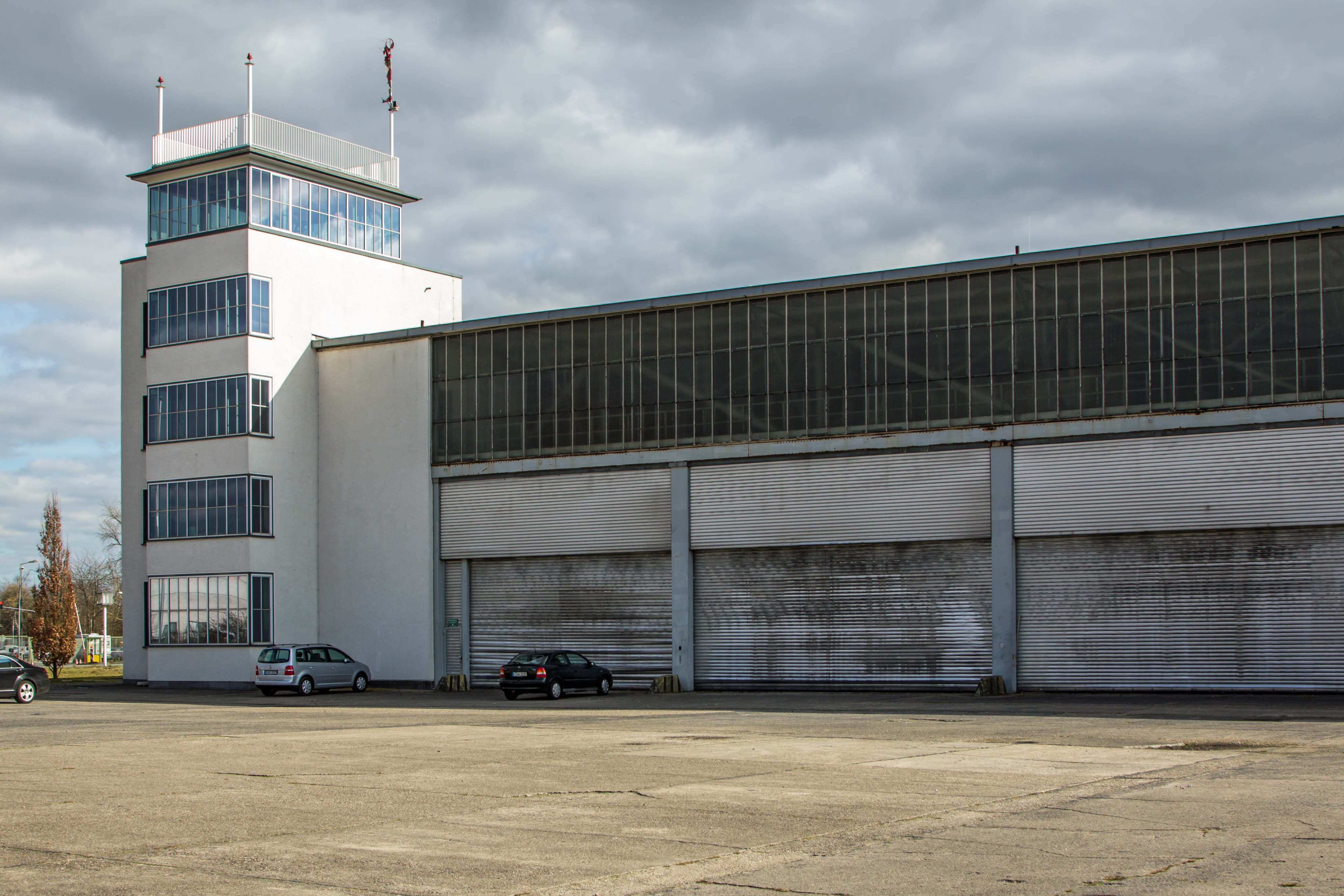 Kontrollturm und Flugzeughalle 1 des ehemaligen Flughafens Köln-Butzweilerhof